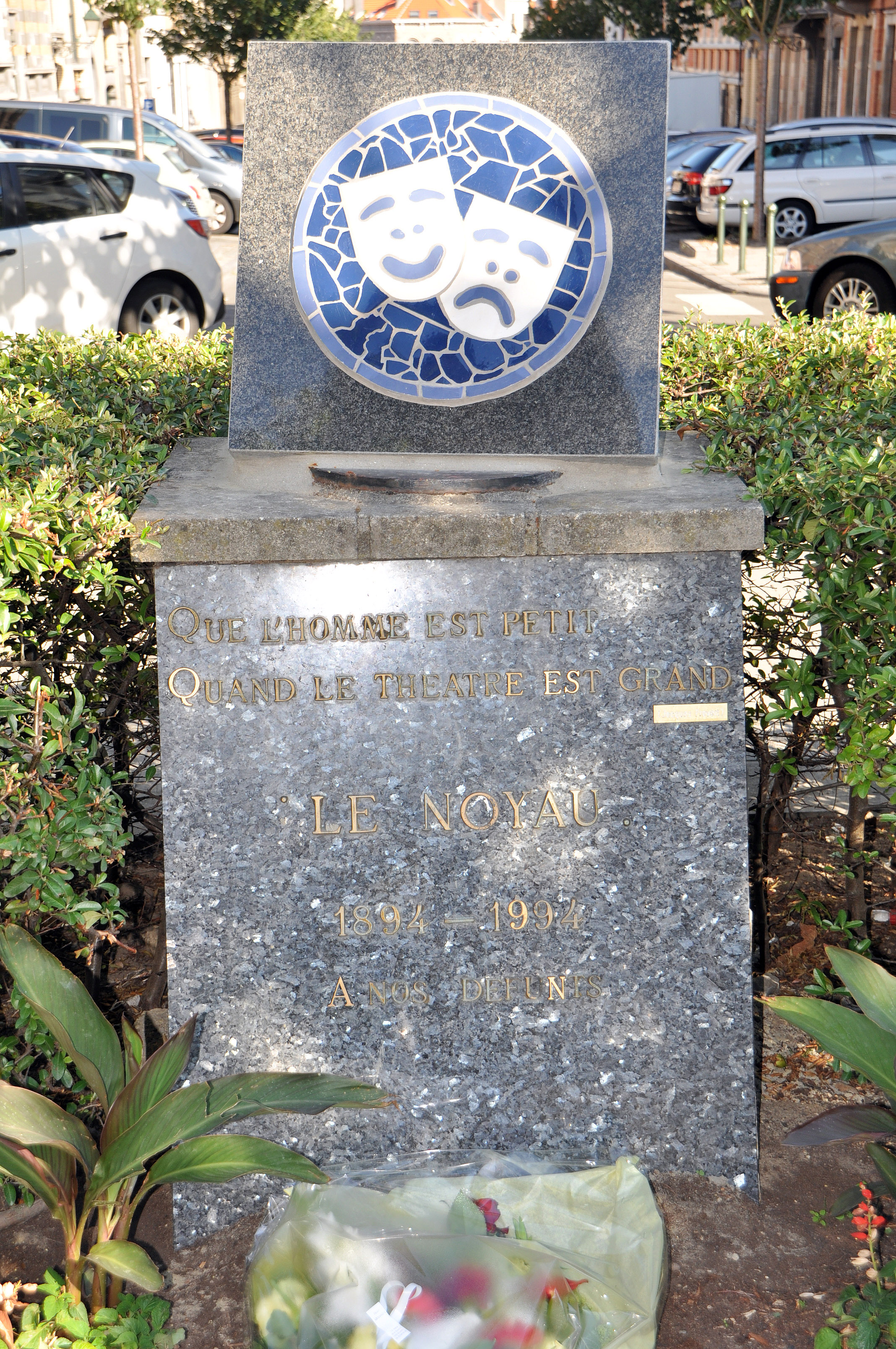 Stèle commémorative du Noyau inaugurée par le Bourgmestre d'Etterbeek Vincent De Wolf, le Président du Noyau Jacques De Klerck et le vice-Président Roland Delsaux le 6 mai 1994 sur la Place Saint Antoine à Etterbeek. Réalisé dans le cadre du centième anniversaire du Noyau.